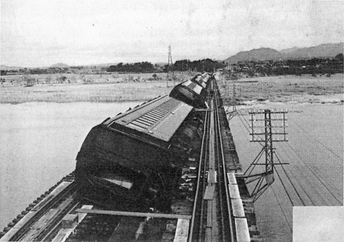 1934年9月21日、室戸台風による東海道線瀬田川橋梁での脱線事故。復旧作業に吹田工場が出動した。